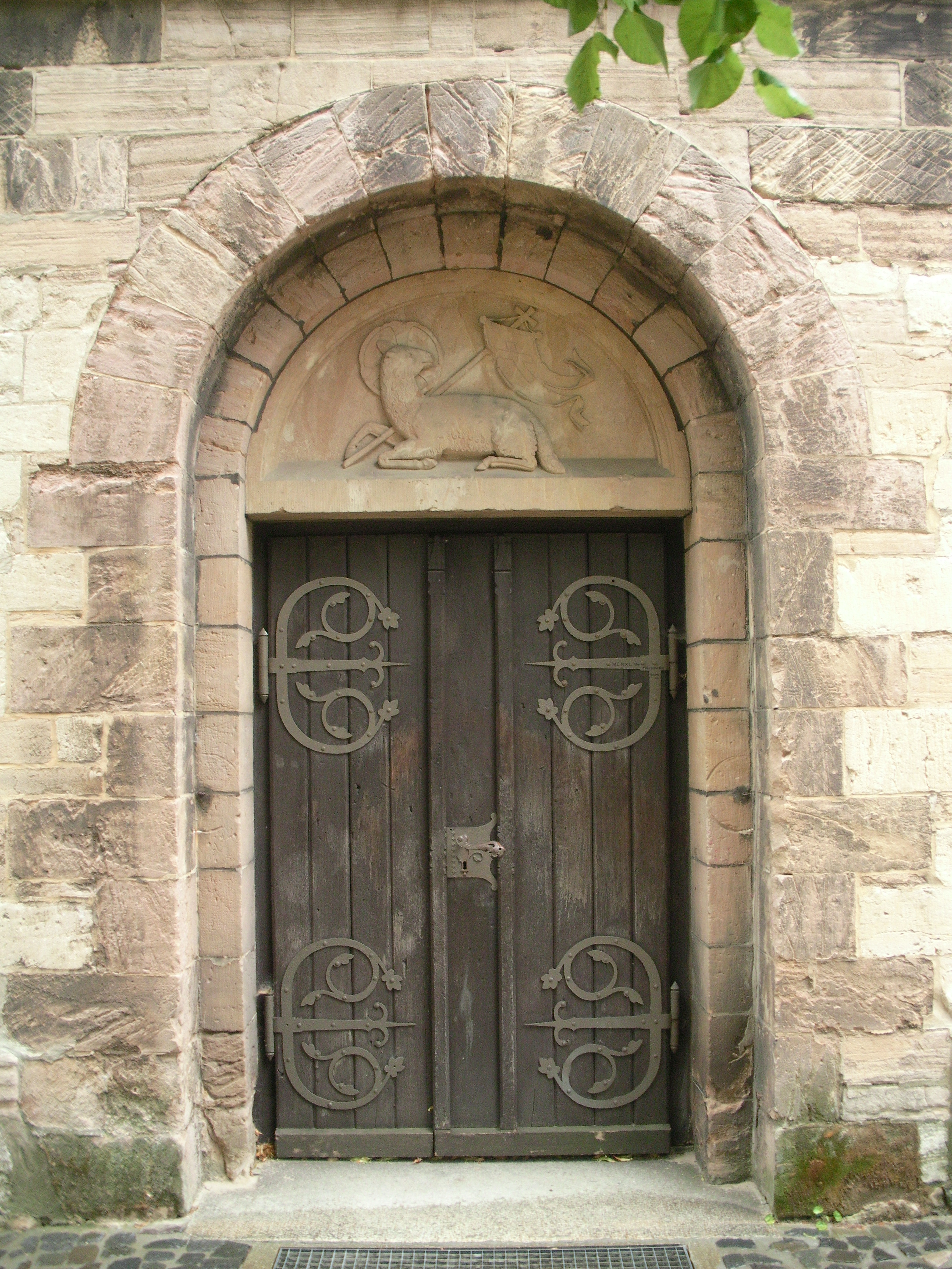 Westportal der St.-Johannis-Kirche in Wernigerode